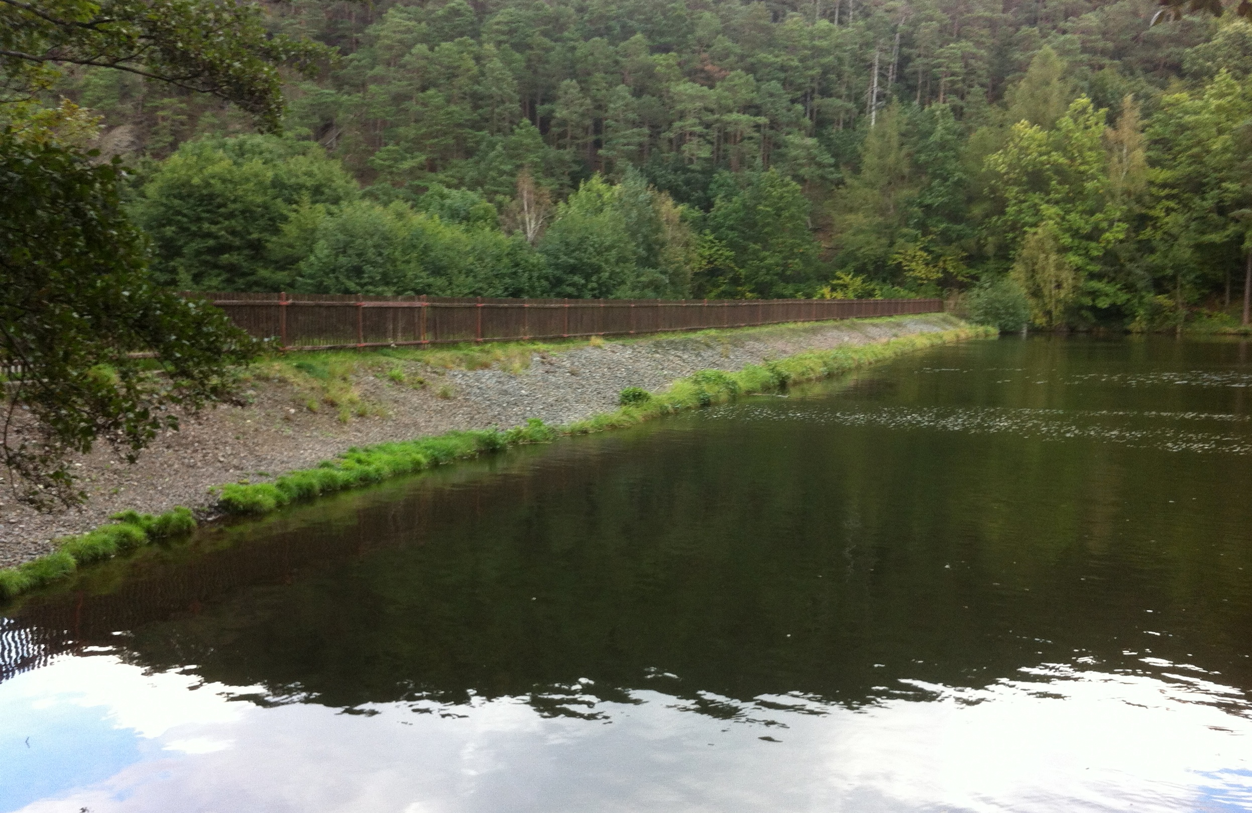 Osterteich Krone